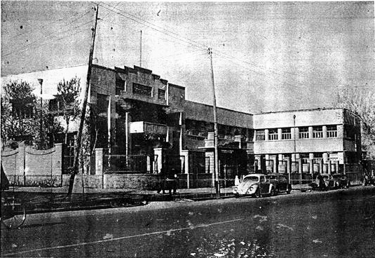 تصویری قدیمی از دبیرستان منصور تبریز